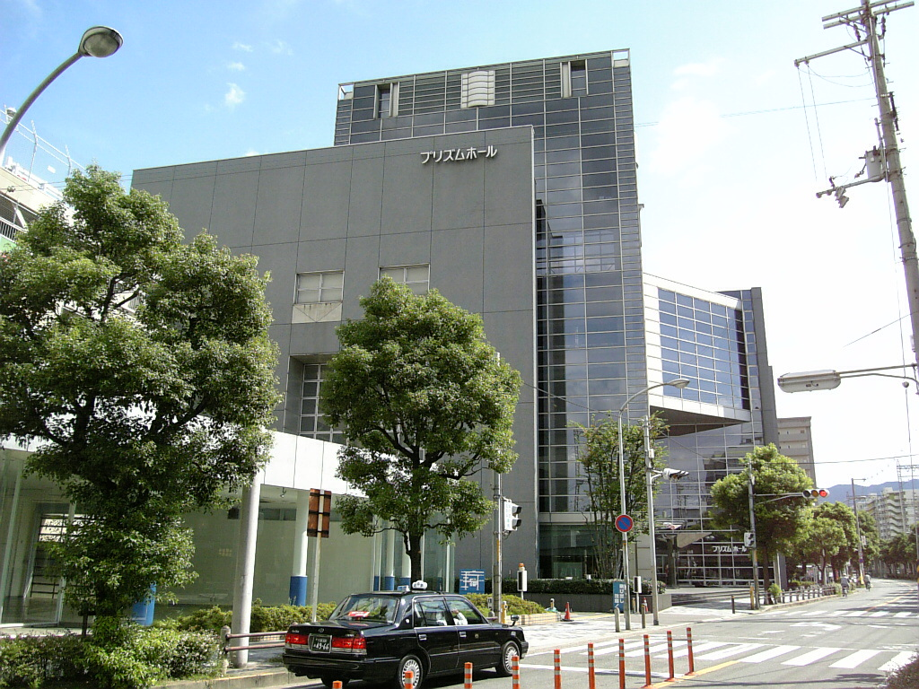 八尾市民会館プリズムホール（大阪府八尾市）